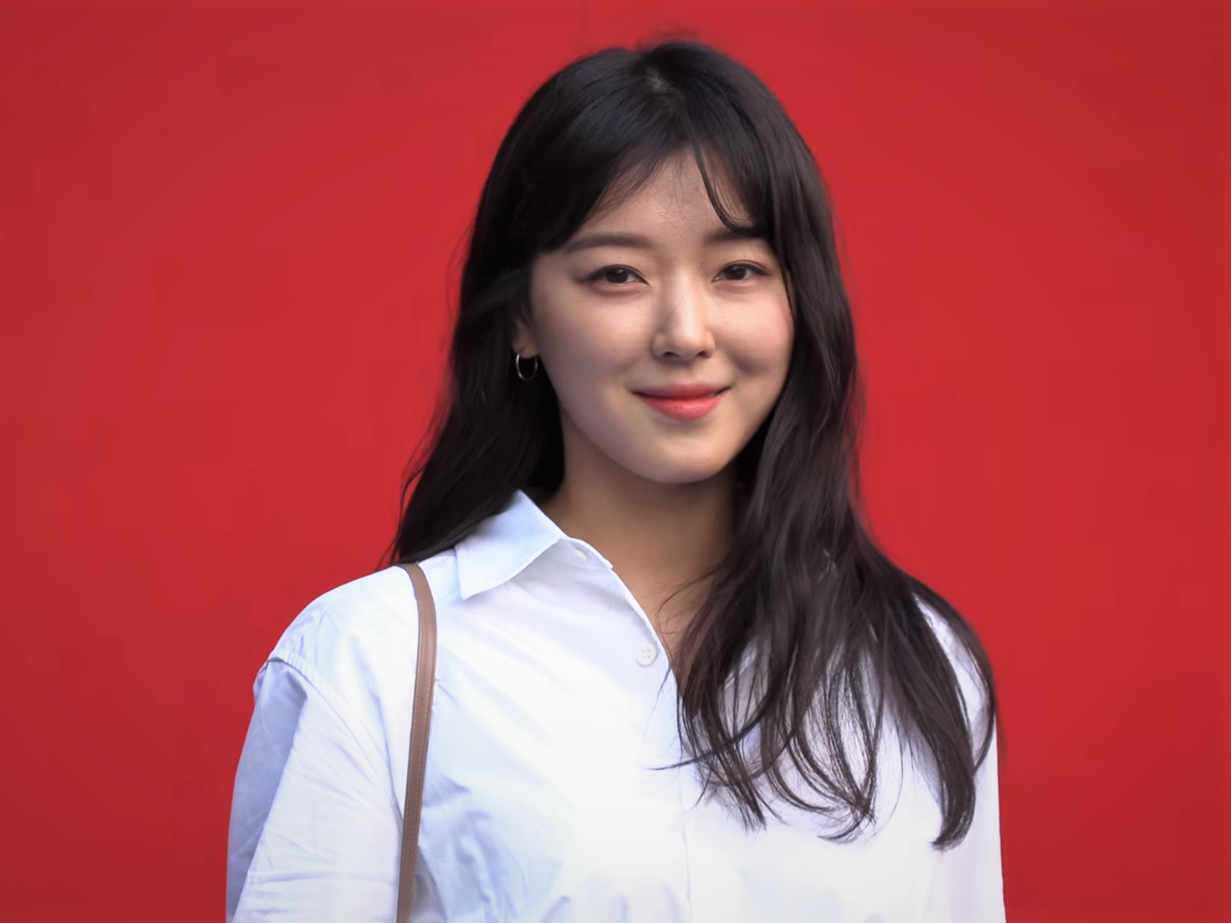 10월 18일 오전 서울 중구 동대문디자인플라자(DDP)에서 2019 S/S 헤라 서울패션위크 ‘모호(MOHO)’ 포토월이 있었다.